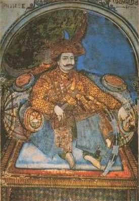 Serfoji II, The king of Thanjavur